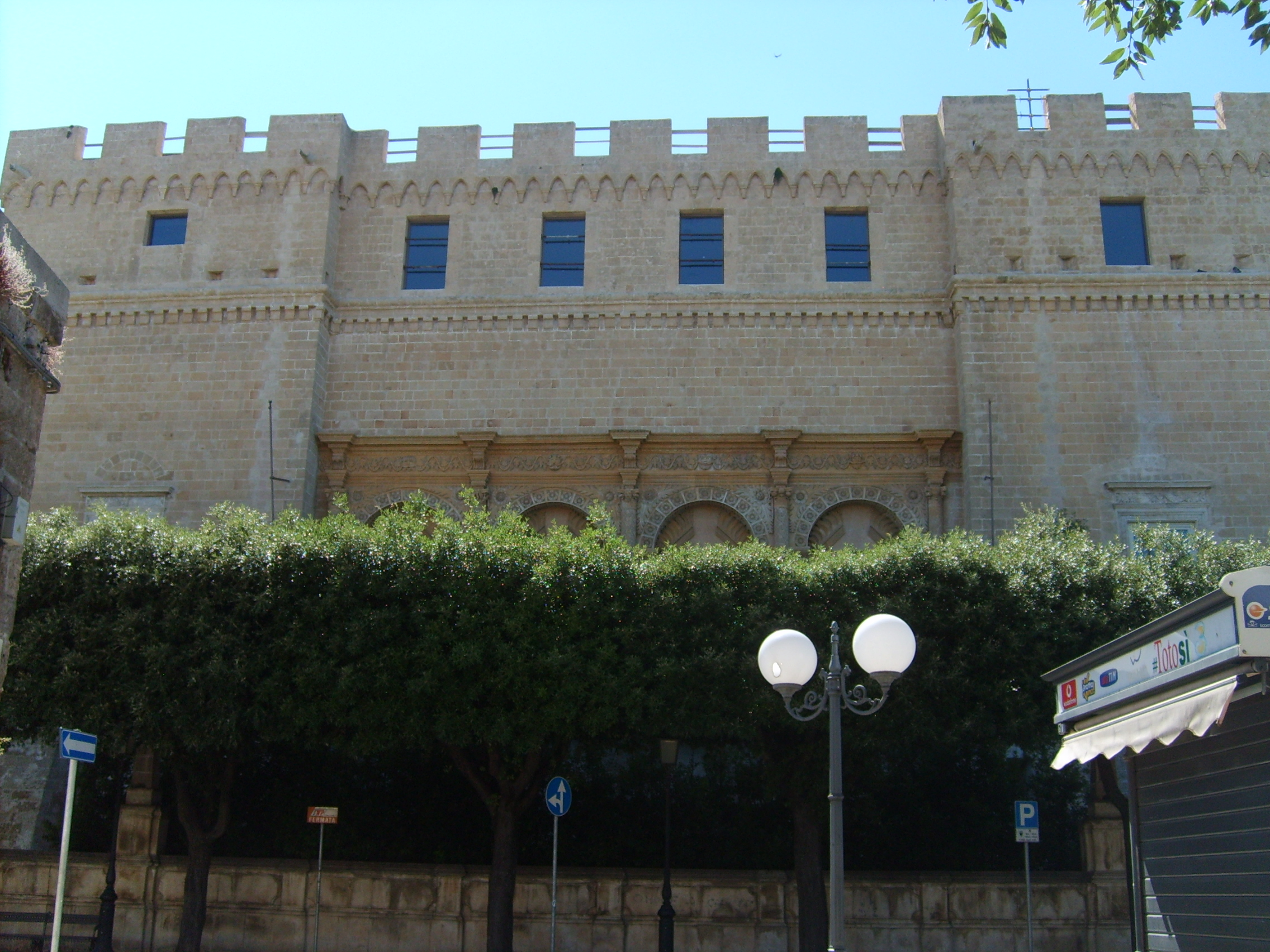 Lato est del Castello Imperiali, a Francavilla Fontana.